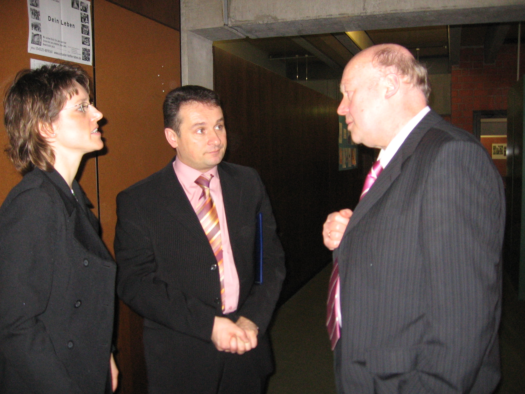 Pagėgių Algimanto Mackaus gimnazijos direktorius Vaclovas Navickas ir Vokietijos Bad Iburg gimnazijos direktorius Hansas-Joachimas Piolingas